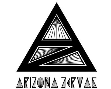 Arizona Zervas's Logo